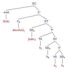 Interrogativa directa parcial, el objeto por el que se pregunta aparece desplazado al especificador del SC y el verbo al núcleo del SC para cotejar rasgos +qu, lo cual produce la inversión verbo-sujeto